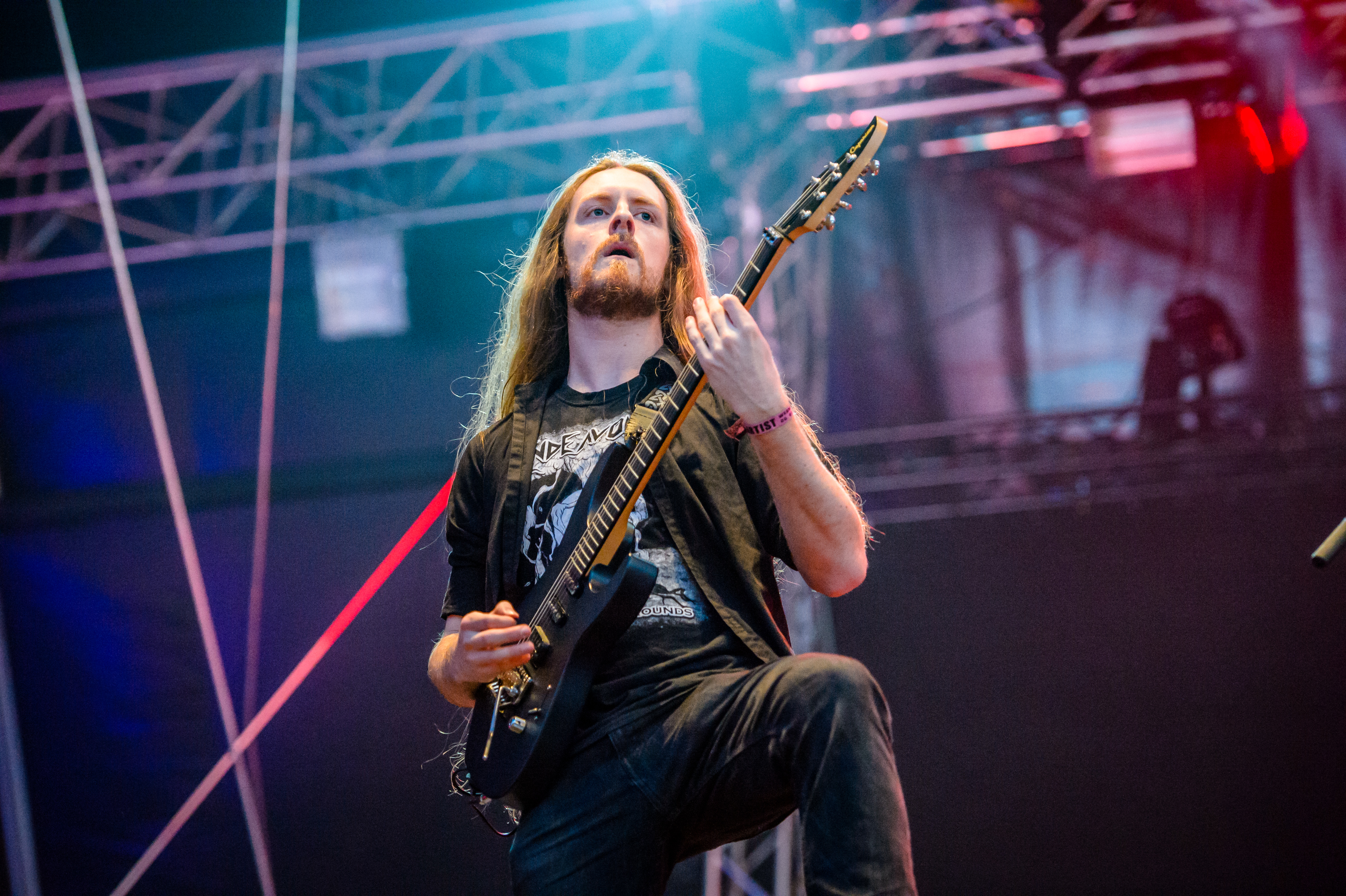 'RockHarz Open Air 2016; Ballenstedt': 'Onslaught'